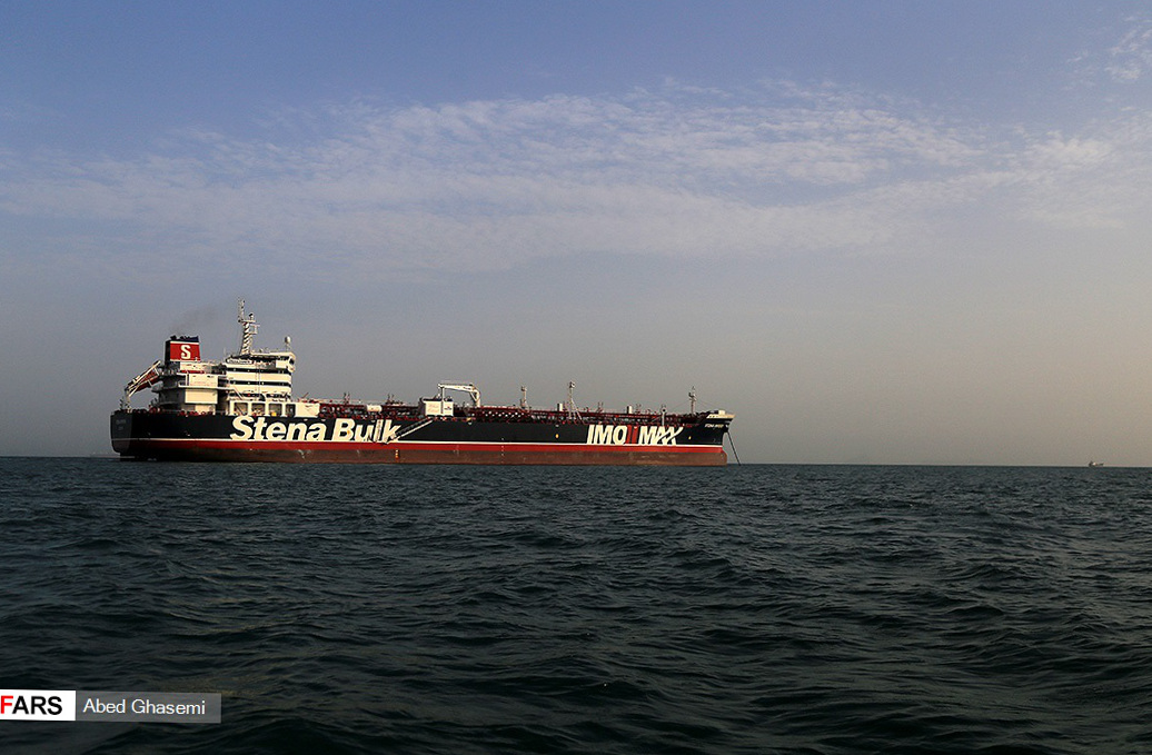 نفتکش انگلیسی استینا ایمپرو، توقیف‌شده توسط ایران